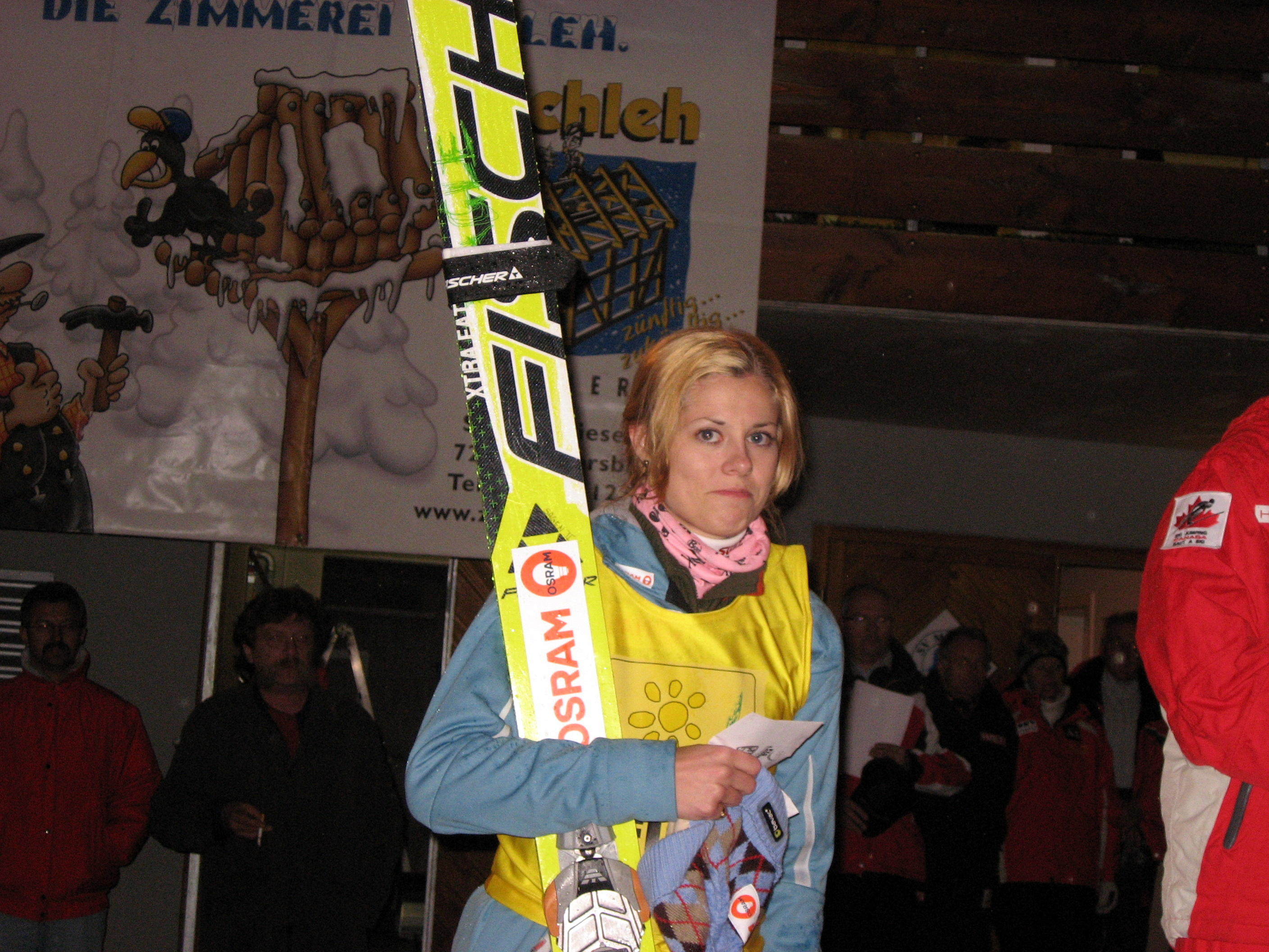 Anette Sagen at Ladies COC ski jumping in Baiersbronn (GER) 2008